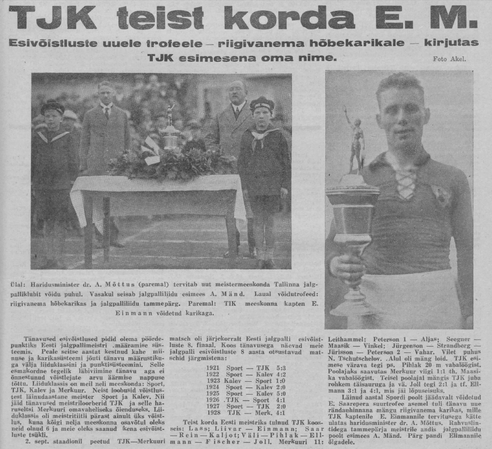 Eesti Spordileht